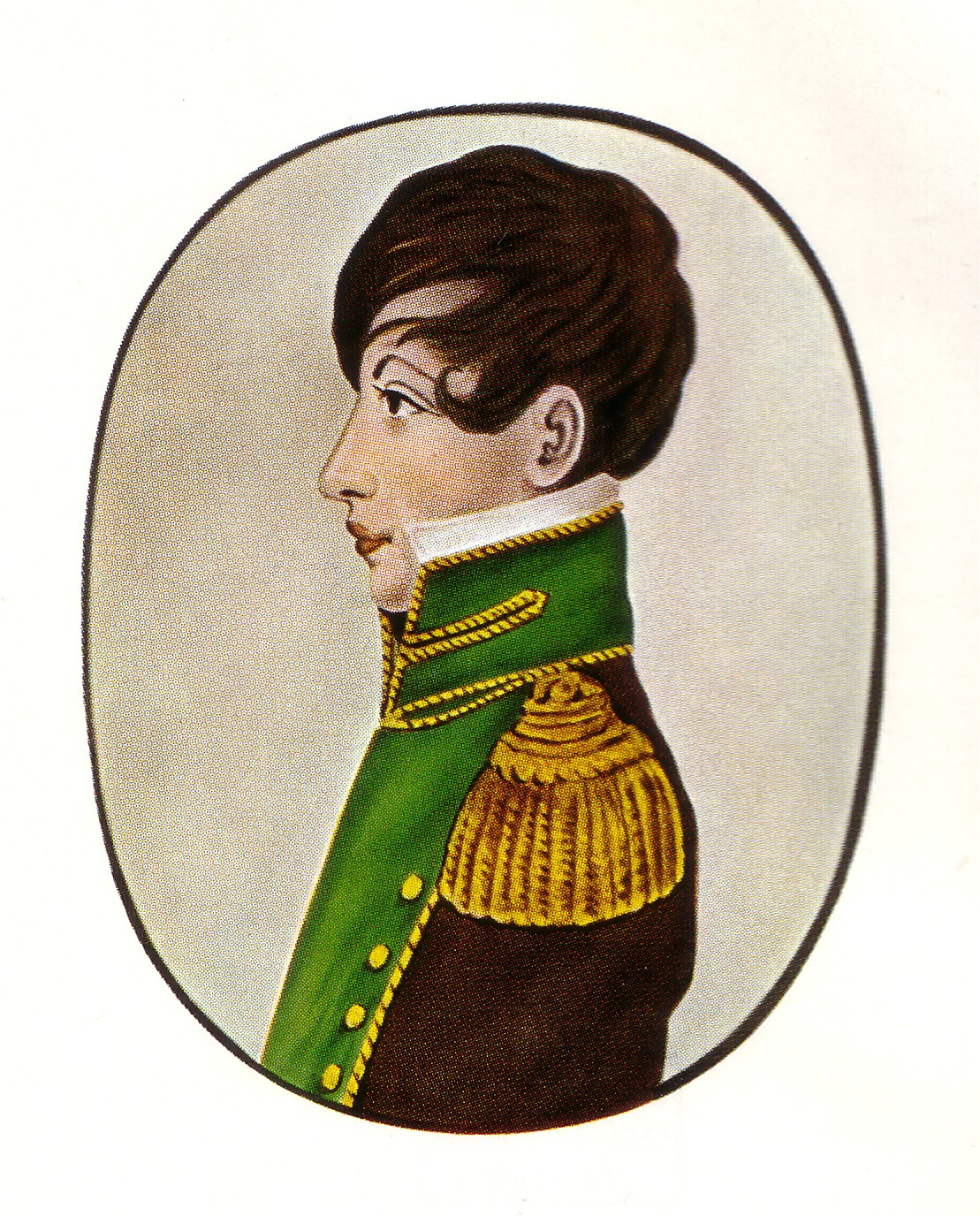 Uniform eines Bayreuther Corpsburschen um 1820